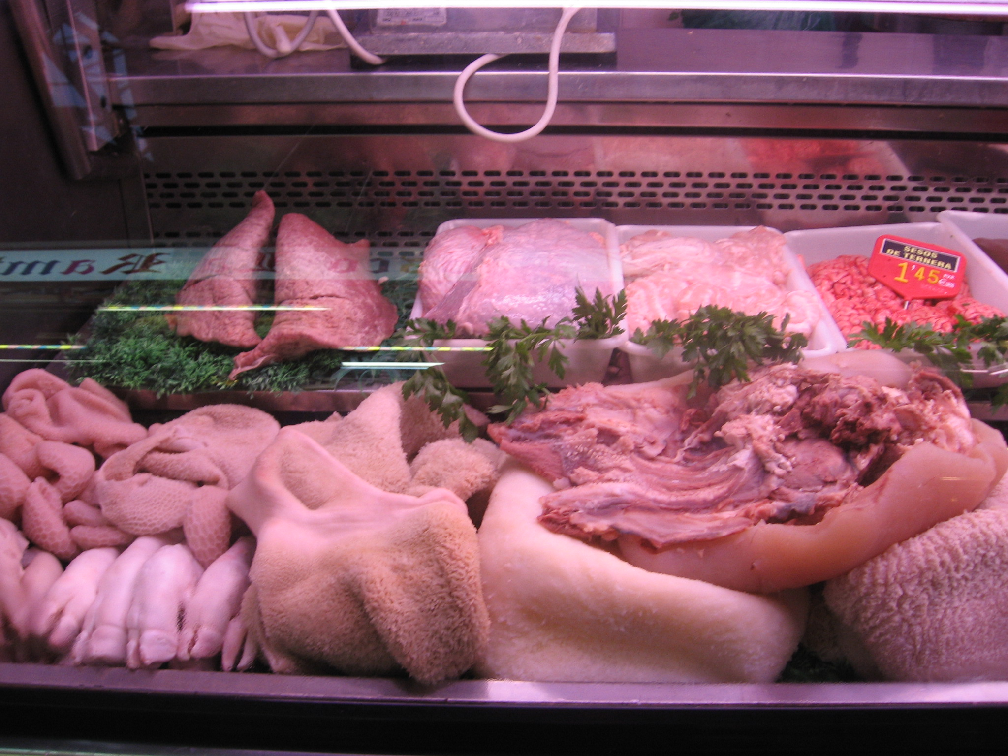 Mercat de la Boqueria, offal (pork legs and more...)